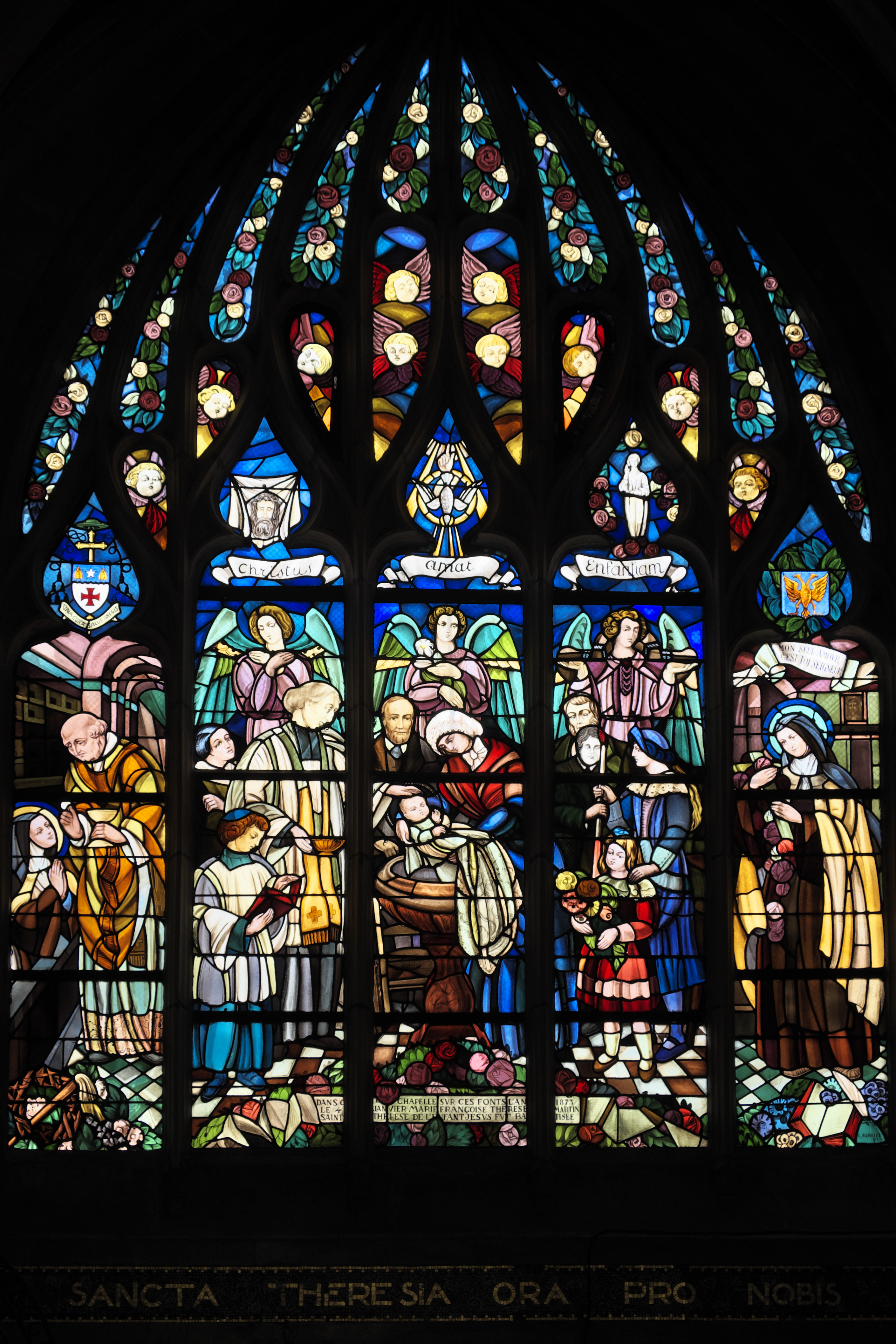 Katholische Pfarrkirche Notre-Dame in Alençon im Département Orne (Region Normandie/Frankreich), Bleiglasfenster mit der Signatur: L.BARILLET 1925